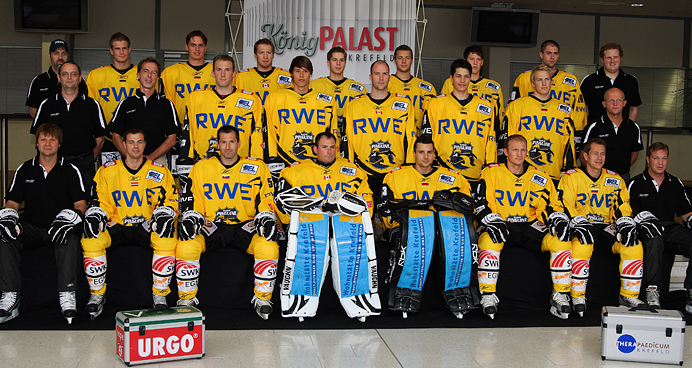 Mannschaftsfoto der Krefeld Pinguine Saison 2008/2009